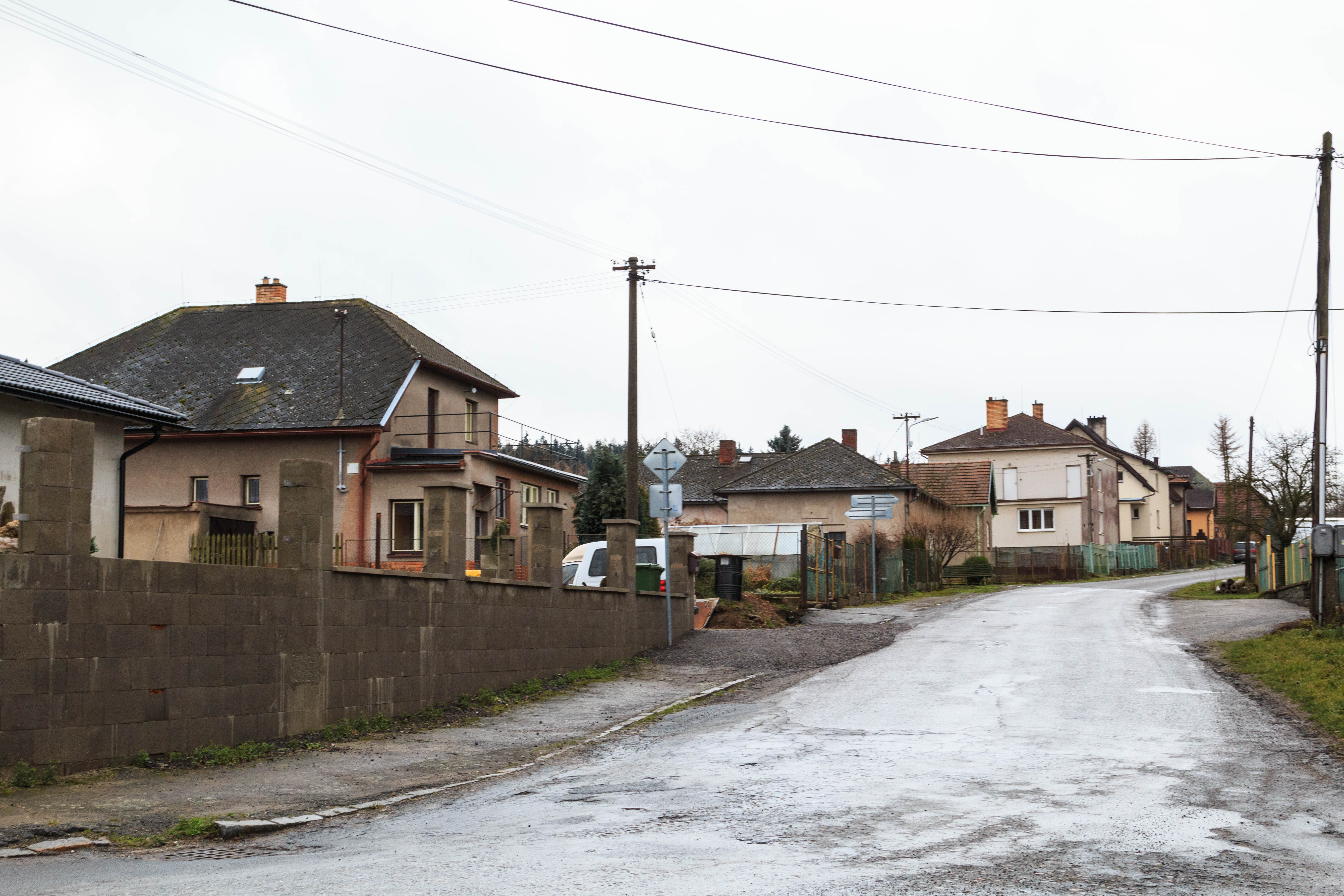 Malčín